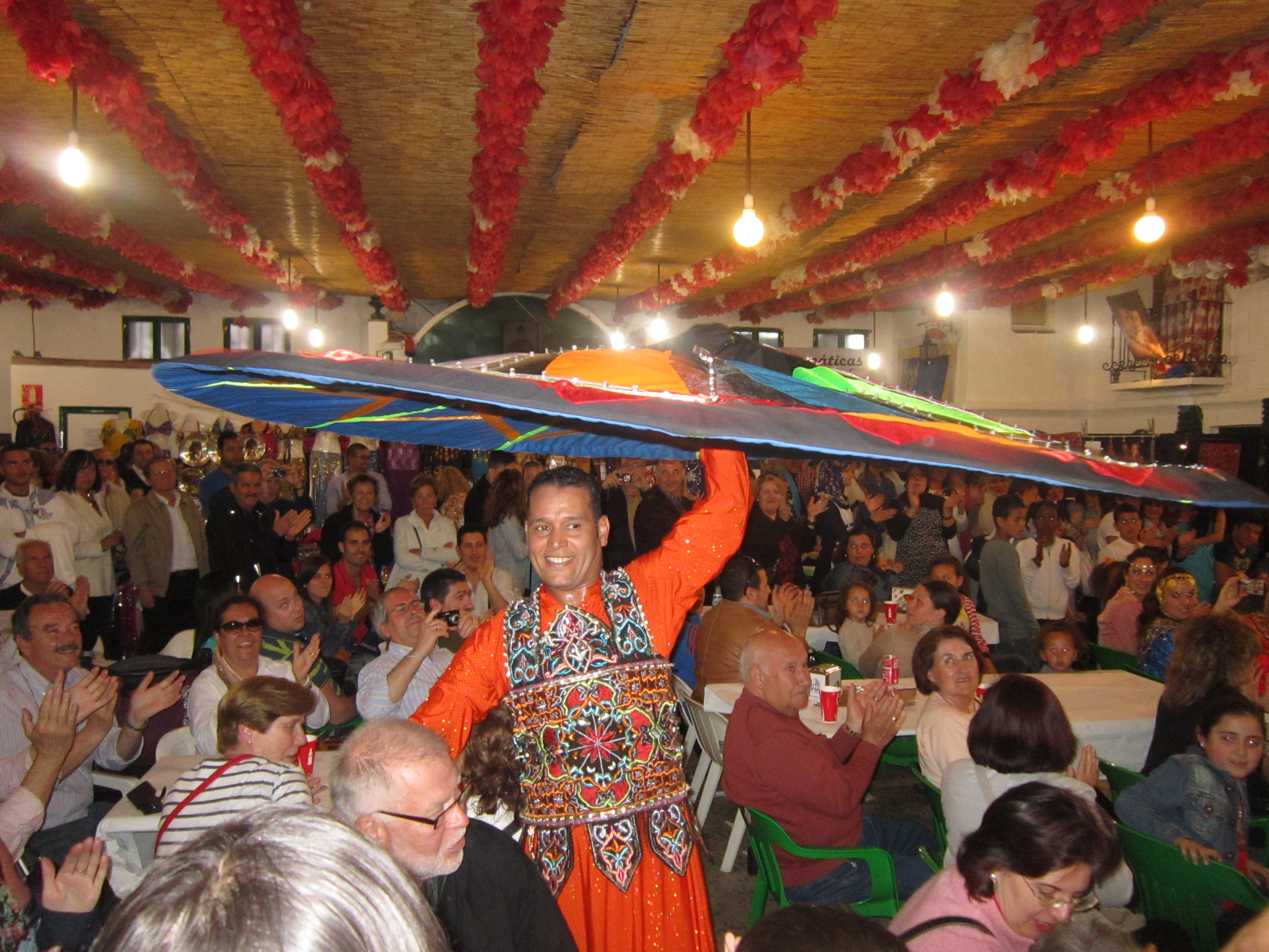 Caseta egyptana